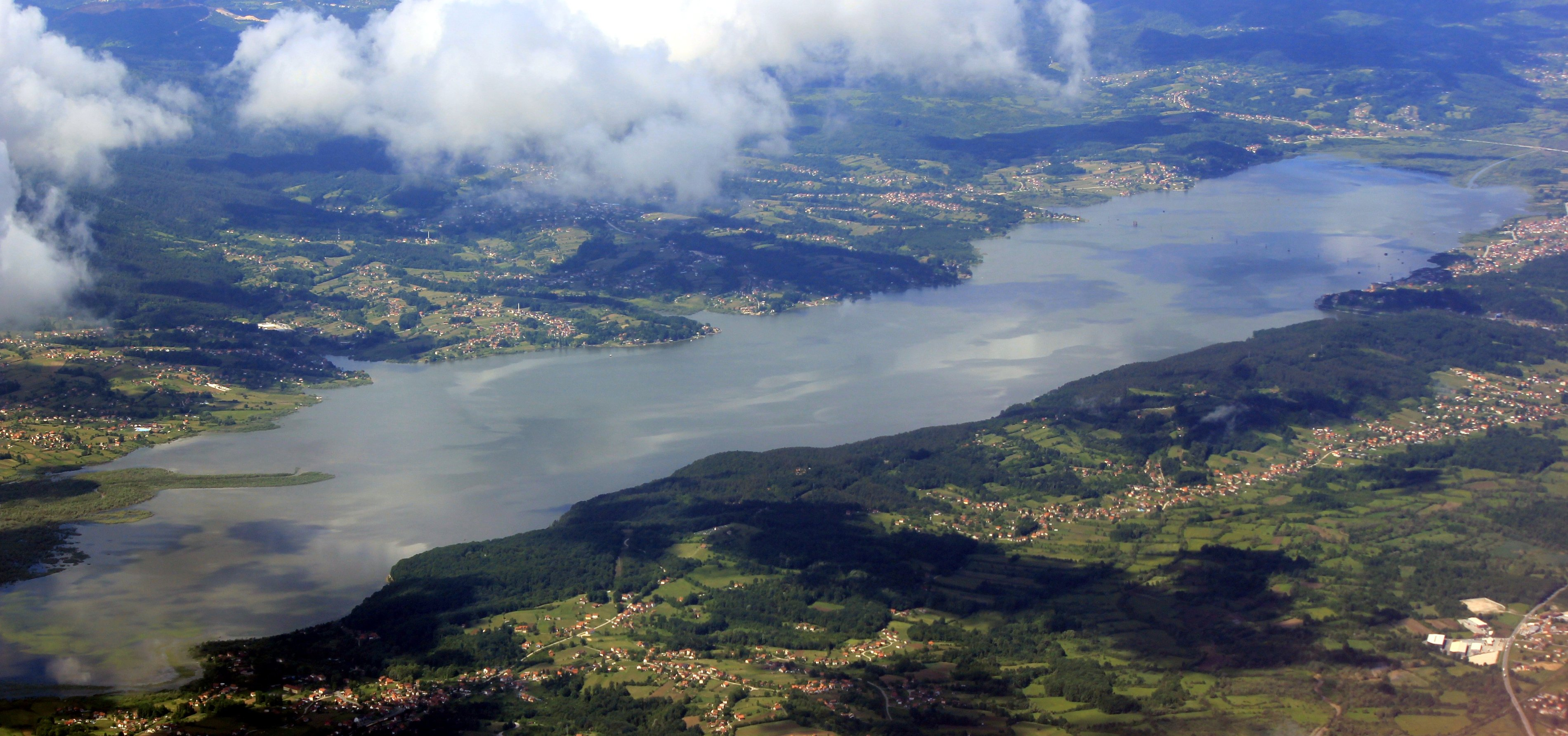 Luftbild des Modračko jezero.